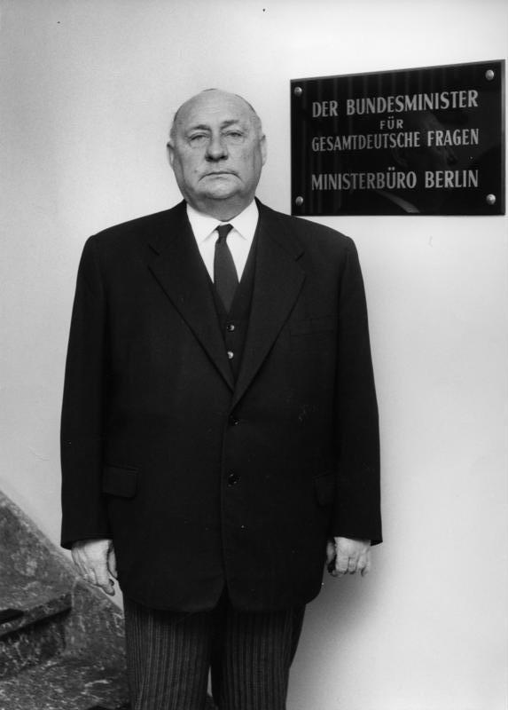 Ernst Lemmer Ernst Lemmer aufgenommen am 21. Sept. 1961 Fotograf: Joachim G. Jung - Bildjournalist - [Porträt Ernst Lemmer neben Amtsschild "Der Bundesminister für gesamtdeutsche Fragen. Ministerbüro Berlin"] Abgebildete Personen: Lemmer, Ernst: Bundesminister für gesamtdeutsche Fragen, CDU, Journalist, Bundesrepublik Deutschland